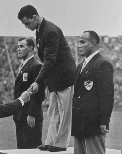 Kelpo Gröndahl, Karl-Erik Nilsson, Ibrahim Orabi 1948